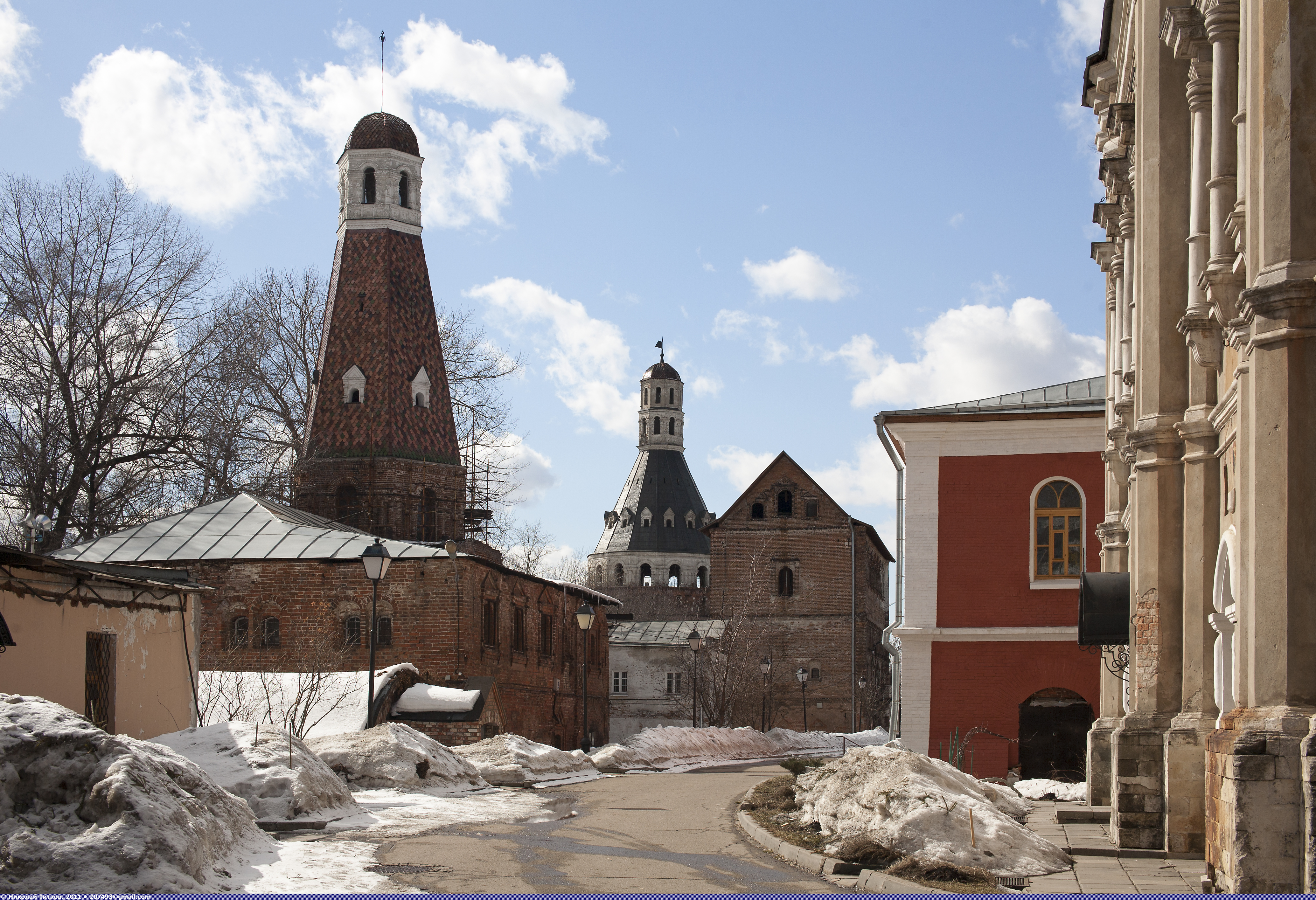 Симонов (Успенский) монастырь — мужской монастырь, ос­но­ван­ный в 1370 году вниз по течению Москвы-реки от Москвы учеником и пле­мян­ни­ком святого пре­подоб­но­го Сергия Ра­донежс­ко­го — святым Фёдором, уроженцем города Радонежа на землях, которые по­жерт­во­вал боярин Степан Ва­силь­евич Ховрин (мо­нашес­кое имя — инок Симон — от чего и про­ис­хо­дит название монастыря). Карточка монастыря